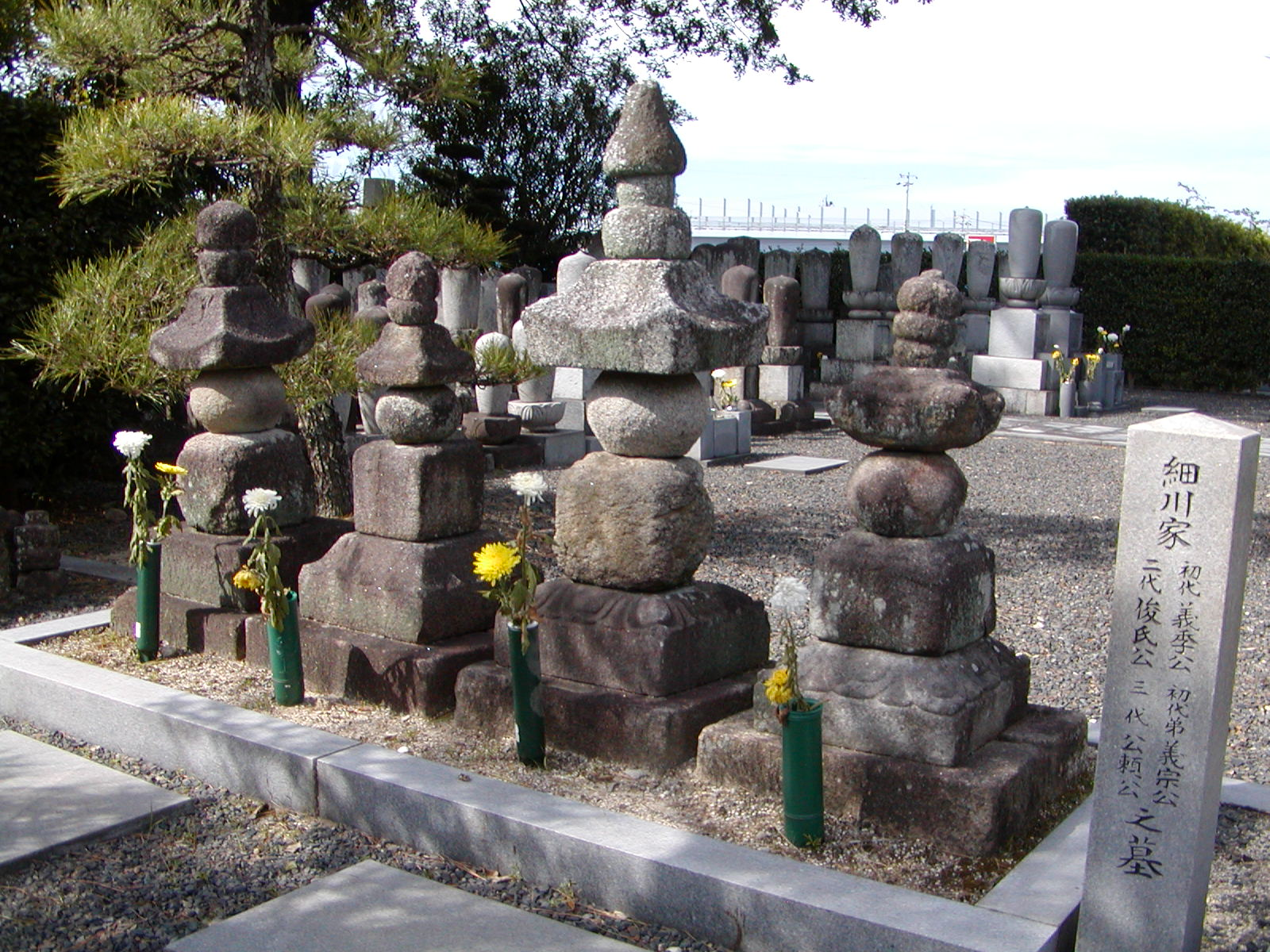 愛知県豊田市隣松寺 細川氏三代墓